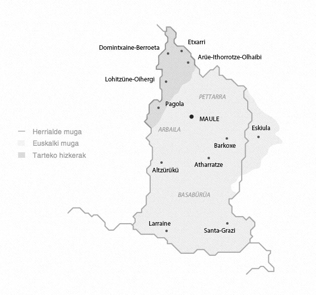 Zuberotar euskararen mapa (Koldo Zuazo, 2015)